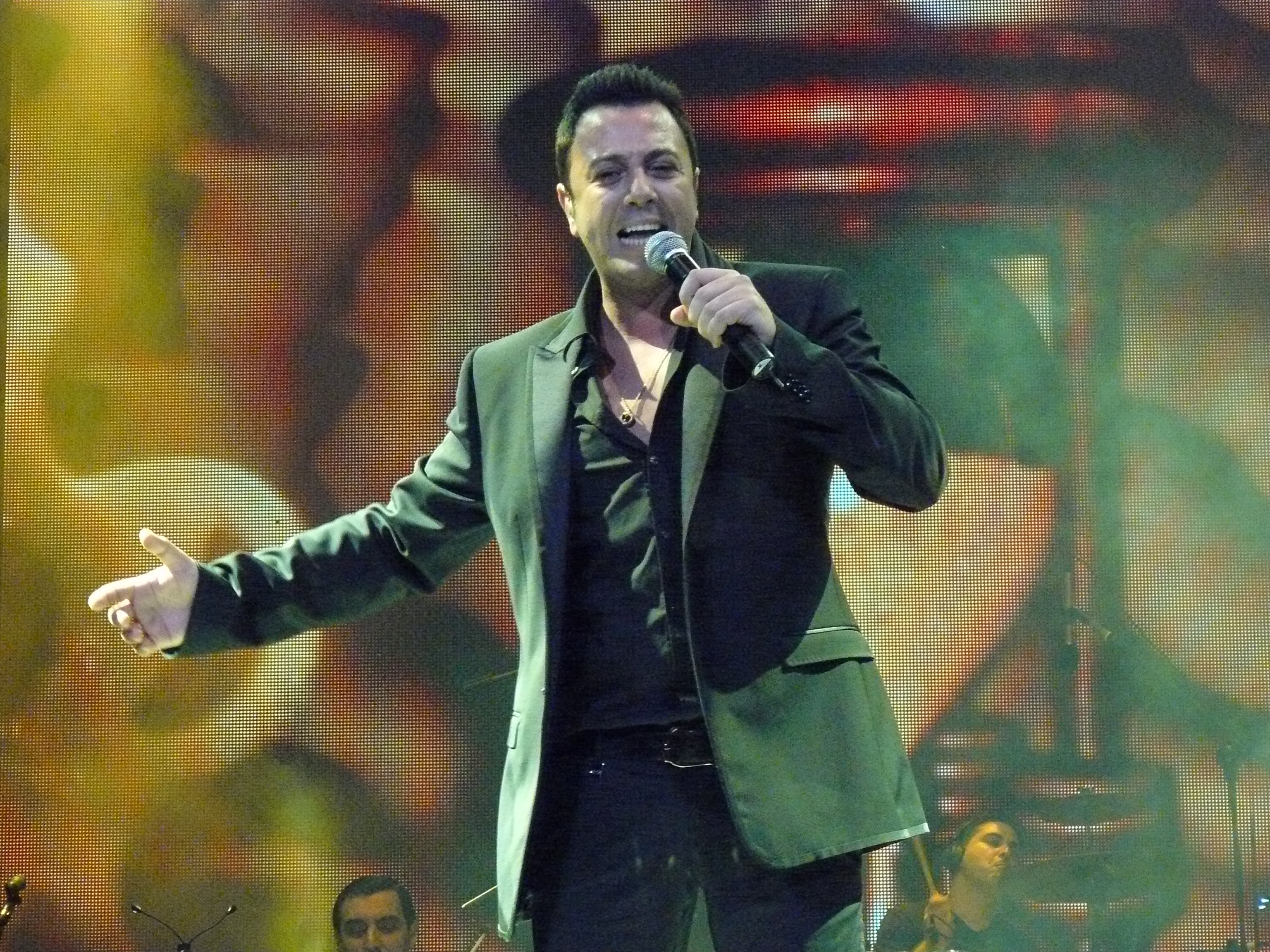 תמונה של ליאור נרקיס מההופעה בקיסריה